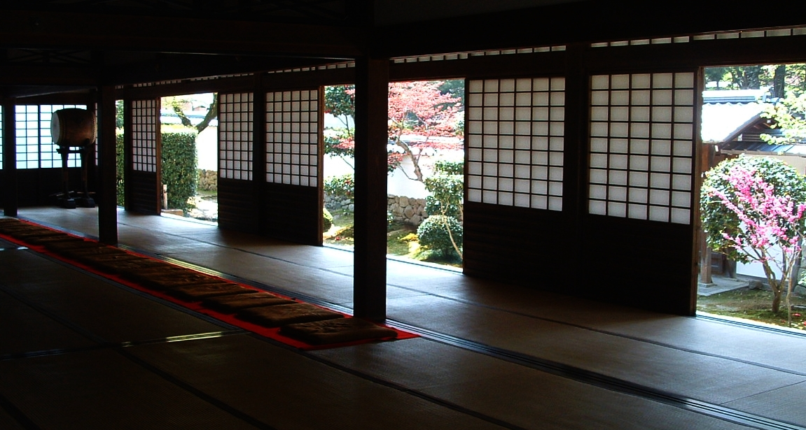 Nanzen-ji, Teahall and garden Photograph by Gakuro